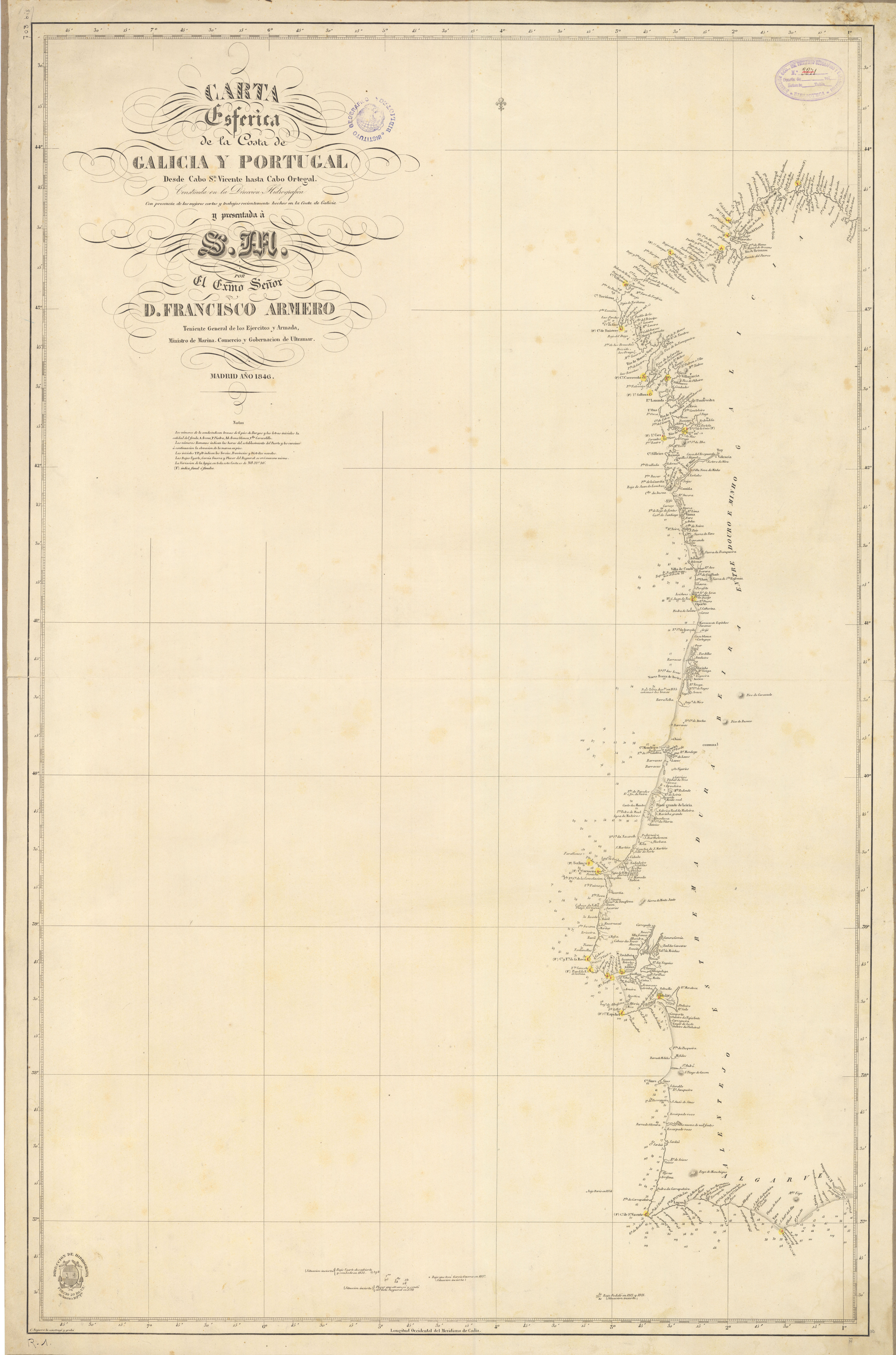 Descripción Física: 1 carta náutica : montada sobre tela ; 93,5 x 60 cm en una h. de 97 x 64 cm. Descripción Cartográfica: Comprende las costas de Galicia y Portugal. realizados por la Dirección de Trabajos Hidrográficos o Dirección de Hidrografía, organismo para el estudio y fomento de la cartografía náutica que empezó a funcionar en 1789 con el nombre de Depósito Hidrográfico de modo coyuntural y que recibió carácter oficial como organismo cartográfico en 1797. Su primer director fue José Espinosa y Tello. Marco con rotulación de grados y cada 15´con subdivisiones de 1´. Dibujados meridianos y paralelos formando cuadrícula sólo en el mar. Sobre uno de los meridianos figura una flor de lis indicando el N.. Meridiano origen de Cádiz. En el ángulo superior izquierdo, con gran larde caligráfico, título, autor, dedicatoria, lugar y fecha de edición. Debajo, nota sobre los fondos marinos, divisiones navales, y variación magnética. En el ángulo inferior izquierdo, sello de la Dirección Hidrográfica con el precio de la carta y mención de responsabilidad. Relieve representado por normales. La cotas batimétricas están expresadas en brazas de a 6 pies de Burgos. Planimetría con ciudades representadas por pequeños círculos, faros y fanales. La hidrografía representa la desembocadura de los ríos, con denominación de los más importantes. La costa aparece realzada con normales y punteado en las playas. Señalización marítima coloreada a mano. Abundante toponimia costera. Rotulación en letra romanilla e itálica. El título con rúbrica de fantasía. Longitud del meridiano de Cádiz. Datado durante el reinado de Isabel II (1833-1868).